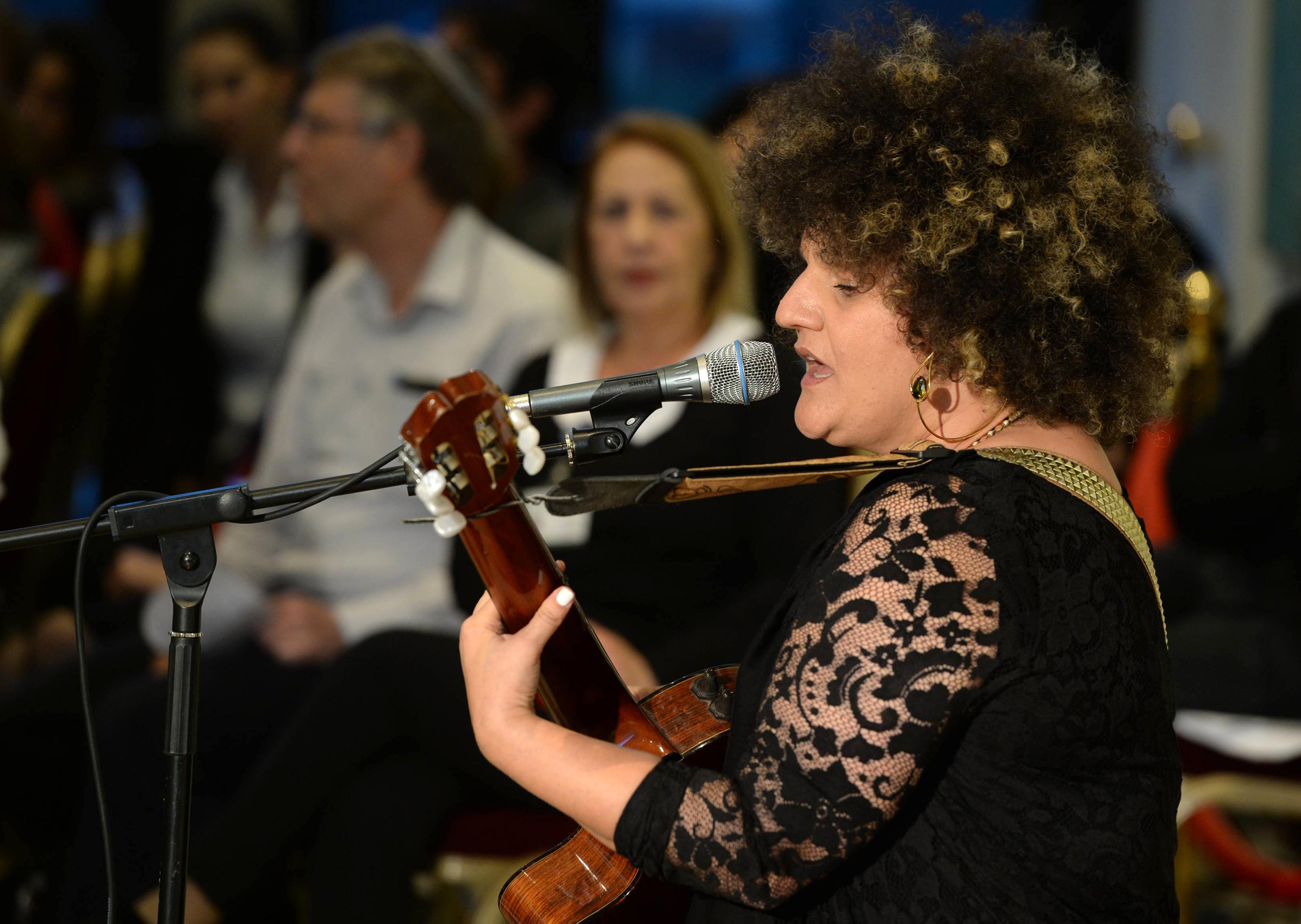 הזמרת קרולינה מופיעה בבית נשיא מדינת ישראל במסגרת מיזם 929 - תנ"ך ביחד